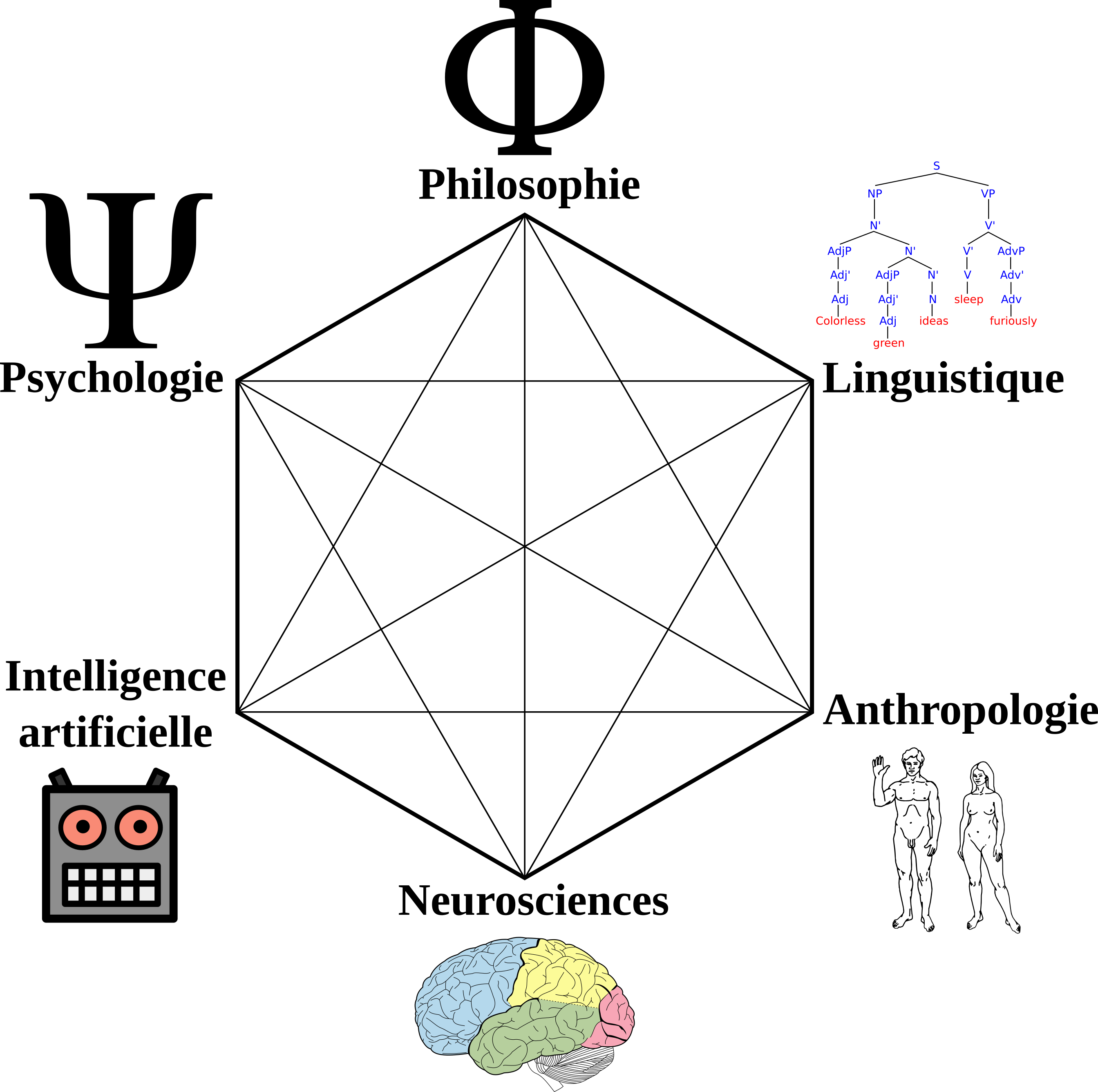 Représentation symbolique des liens interdisciplinaires entre les sciences constitutives du domaine des sciences cognitives. Les traits pleins représentent les liens qui existaient aux premiers temps des sciences cognitives, jusqu'en 1978 ; les traits pointillés représentent les liens interdisciplinaires qui se sont développés depuis.